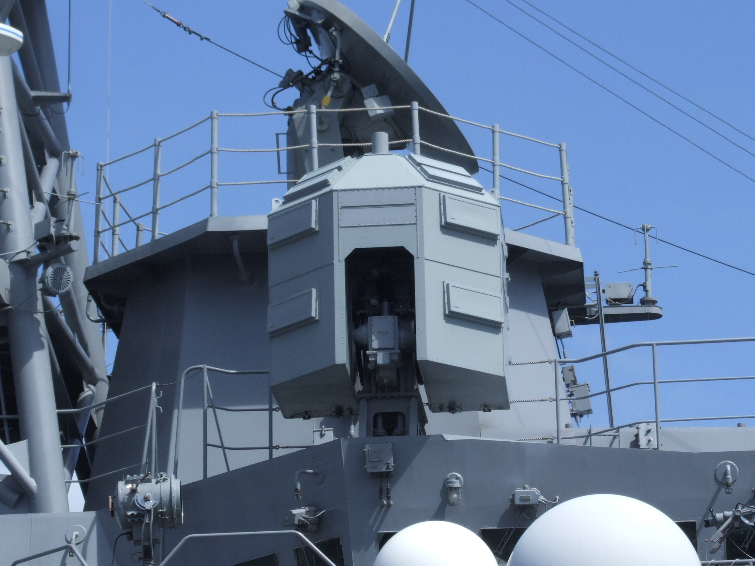 きりしまの電子戦装置